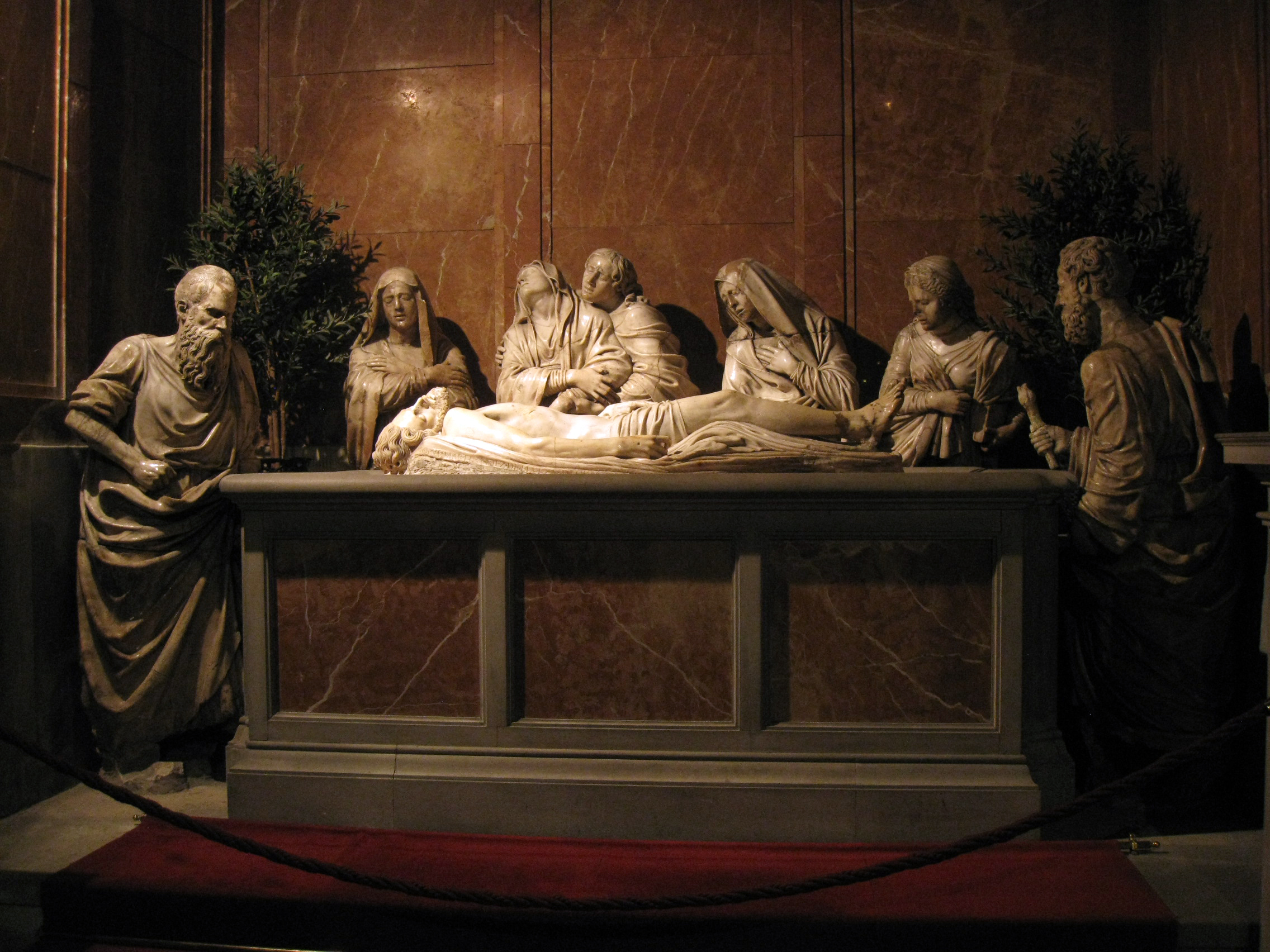 Catedral del Sant Esperit (Terrassa), el_Sant_Enterrament_de_Martín_Díez de Liatzasolo (1544)